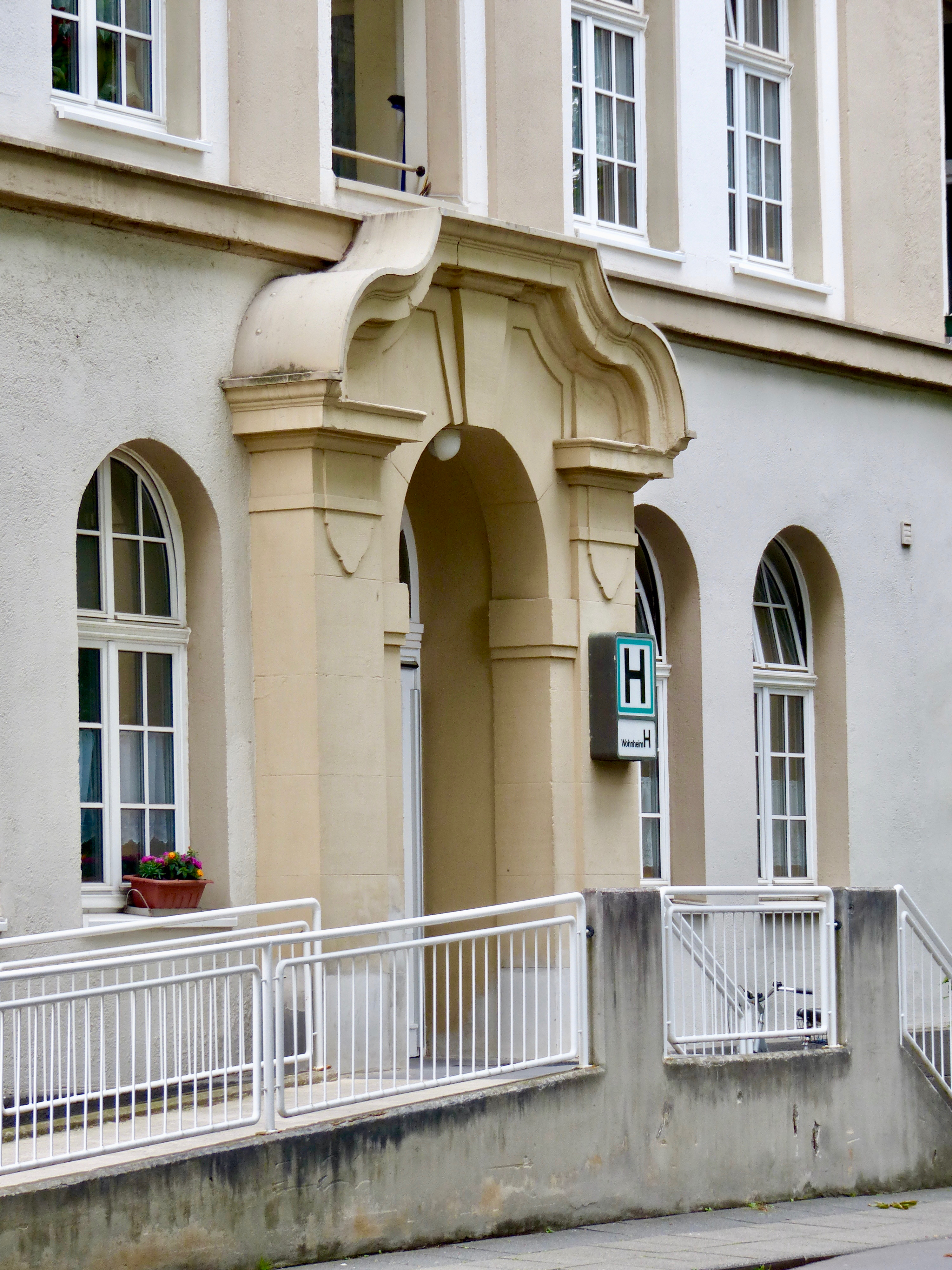 Riehler Heimstätten (2017): Eingang Haus H (ehemalige Kasernengebäude)